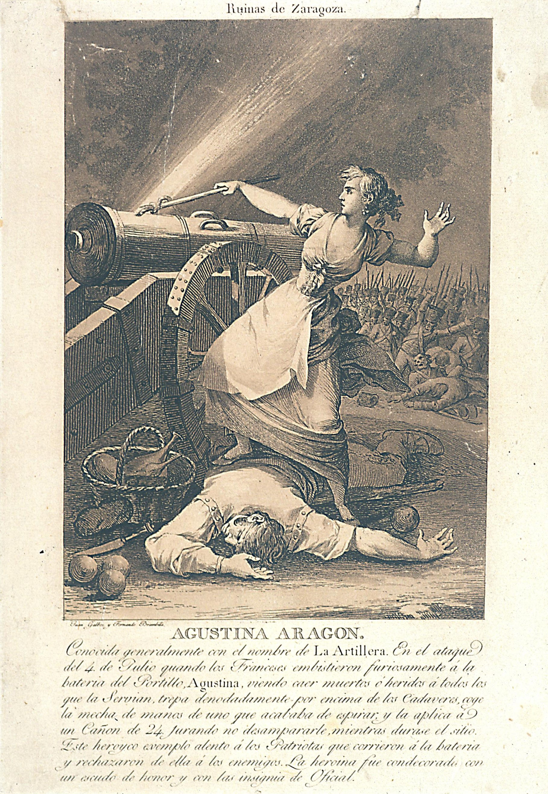 Agustina de Aragon, heroica defensora de Zaragoza durante los Sitios, en la Guerra de la Independencia Española.